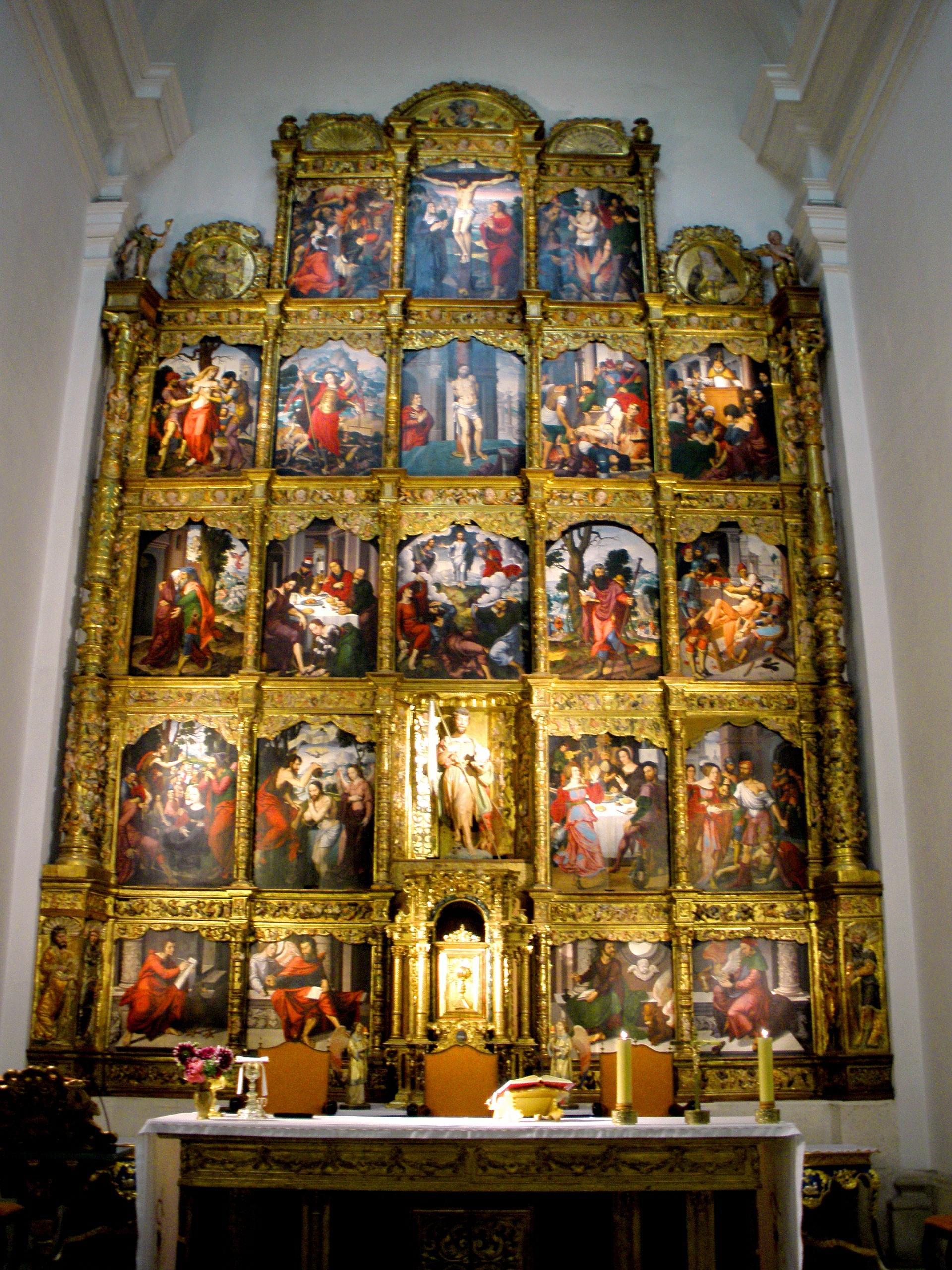 Retablo mayor de la iglesia de San Juan Bautista de Carbonero el Mayor (provincia de Segovia, Castilla y León, España.)